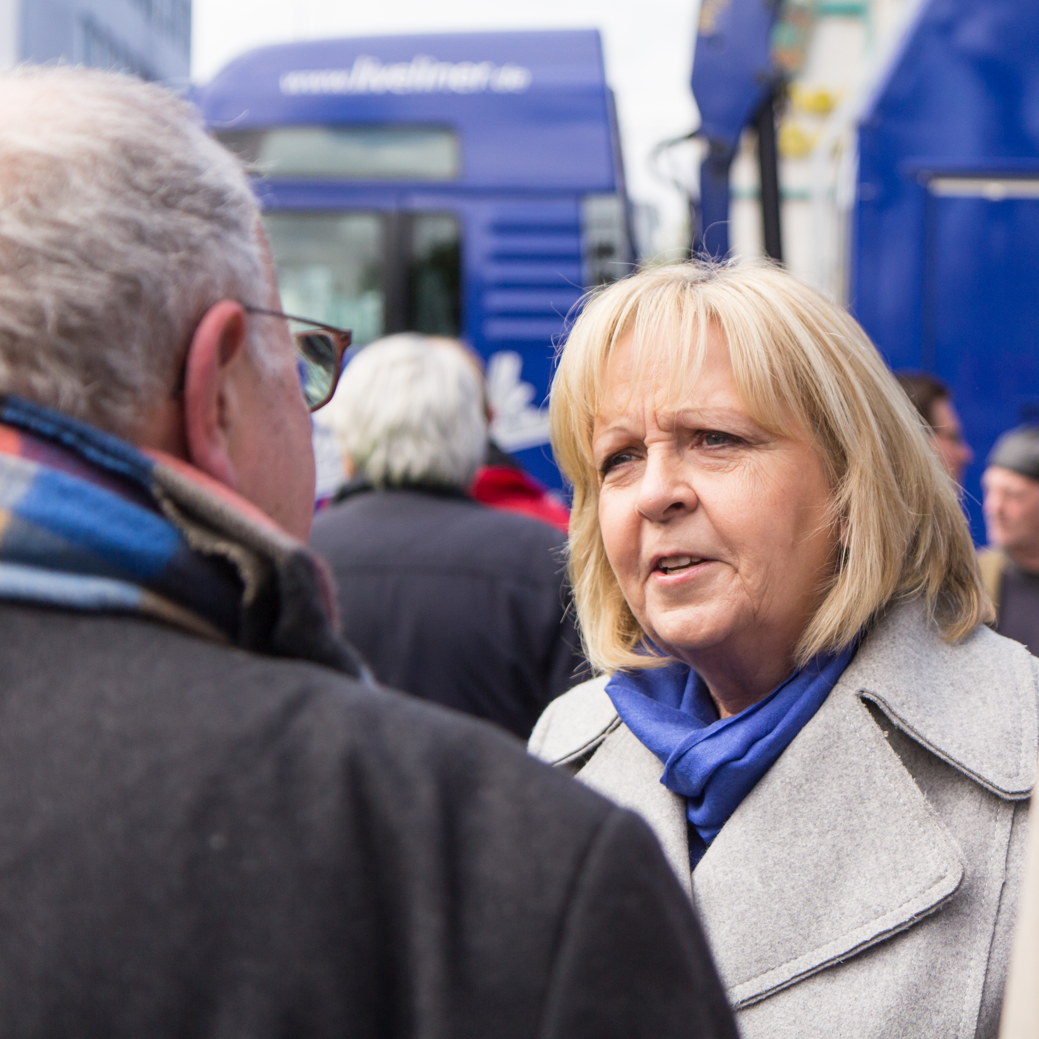 „Tanz die AfD – Gemeinsam für Weltoffenheit, Toleranz und Solidarität“ Gemeinsame Demonstration von 81 Organisationen und Gruppen gegen den AfD-Parteitag in Köln 2017